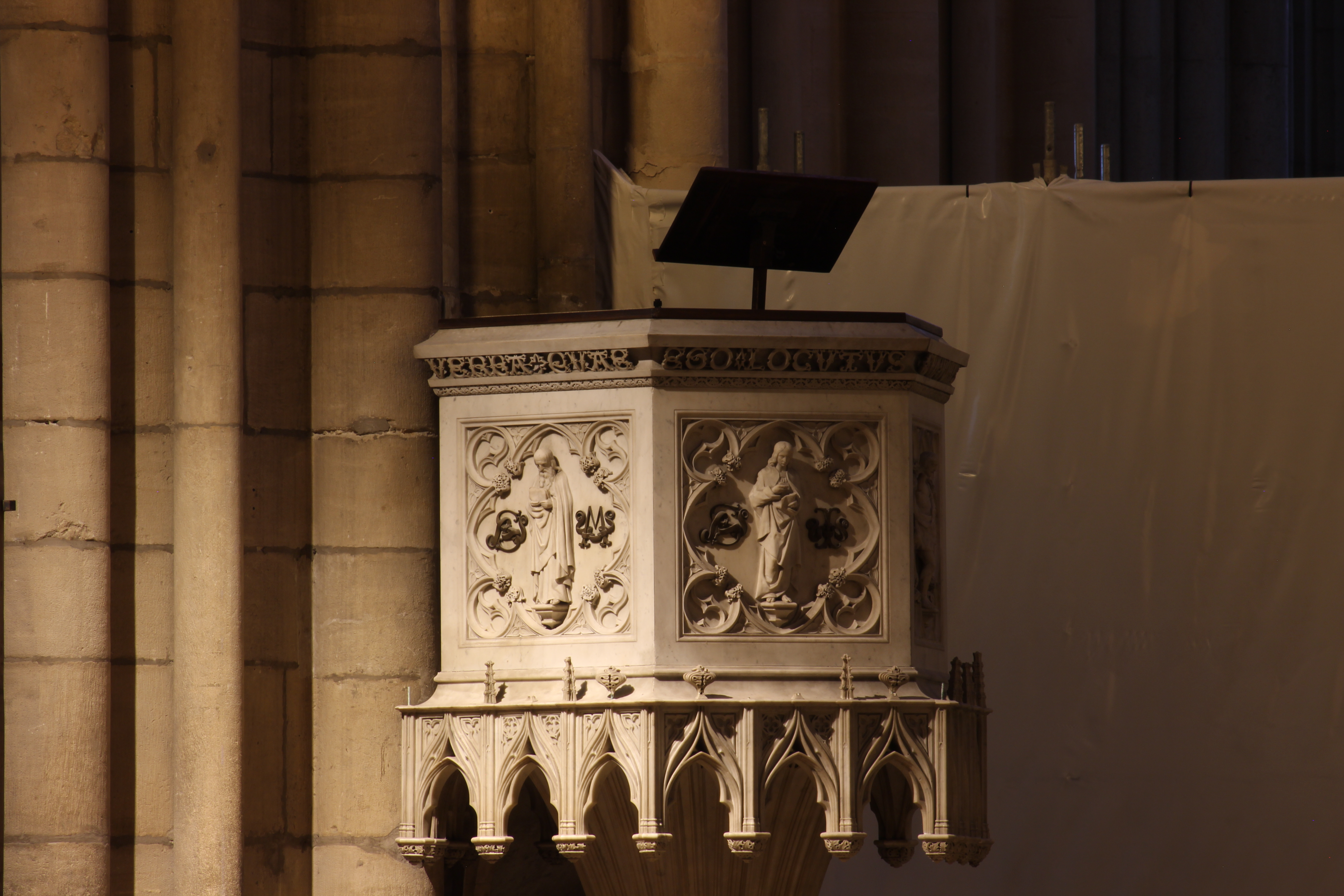 Chaire dans la Primatiale Saint-Jean, à Lyon.